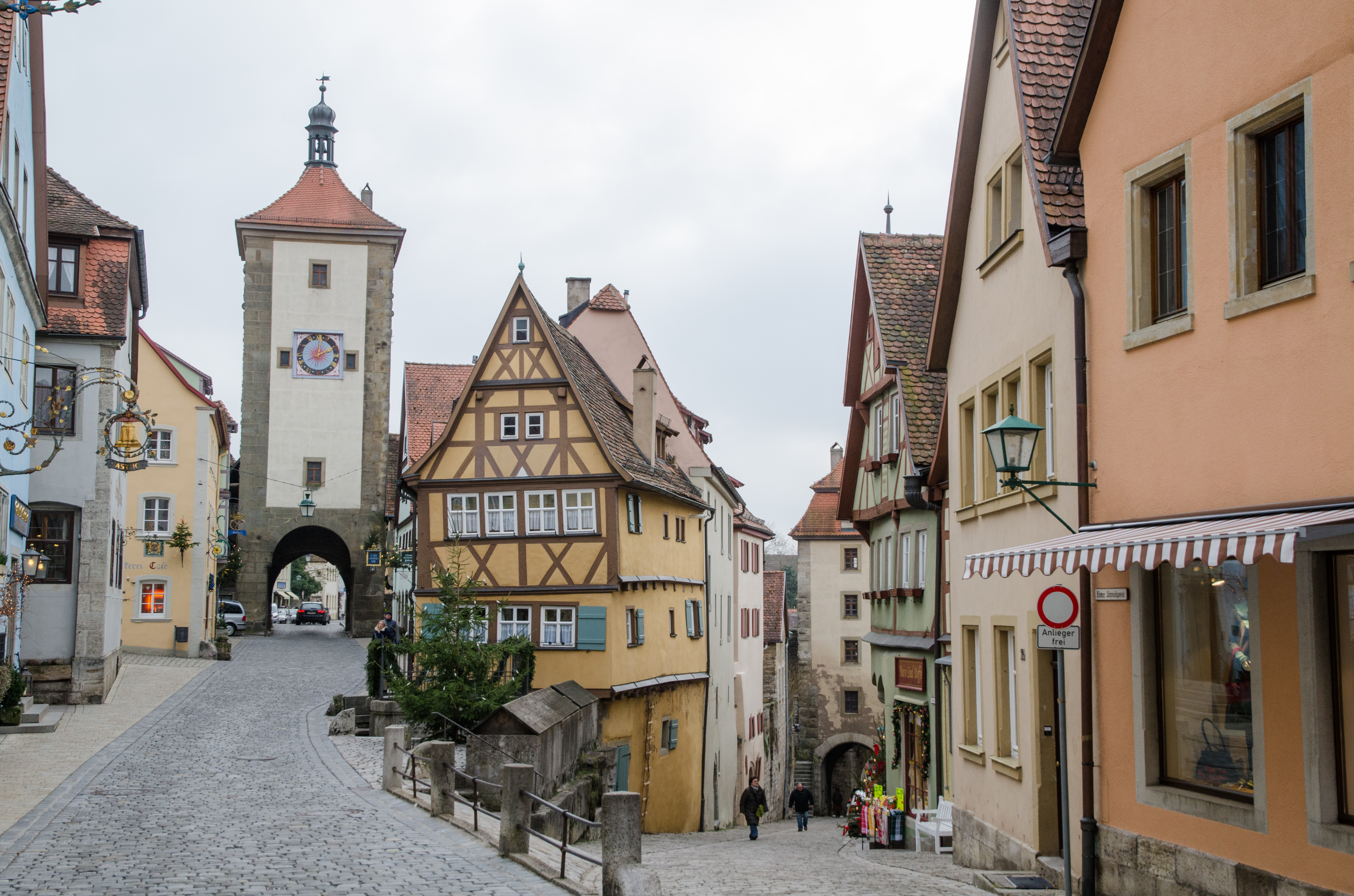 Rothenburg, Plönlein